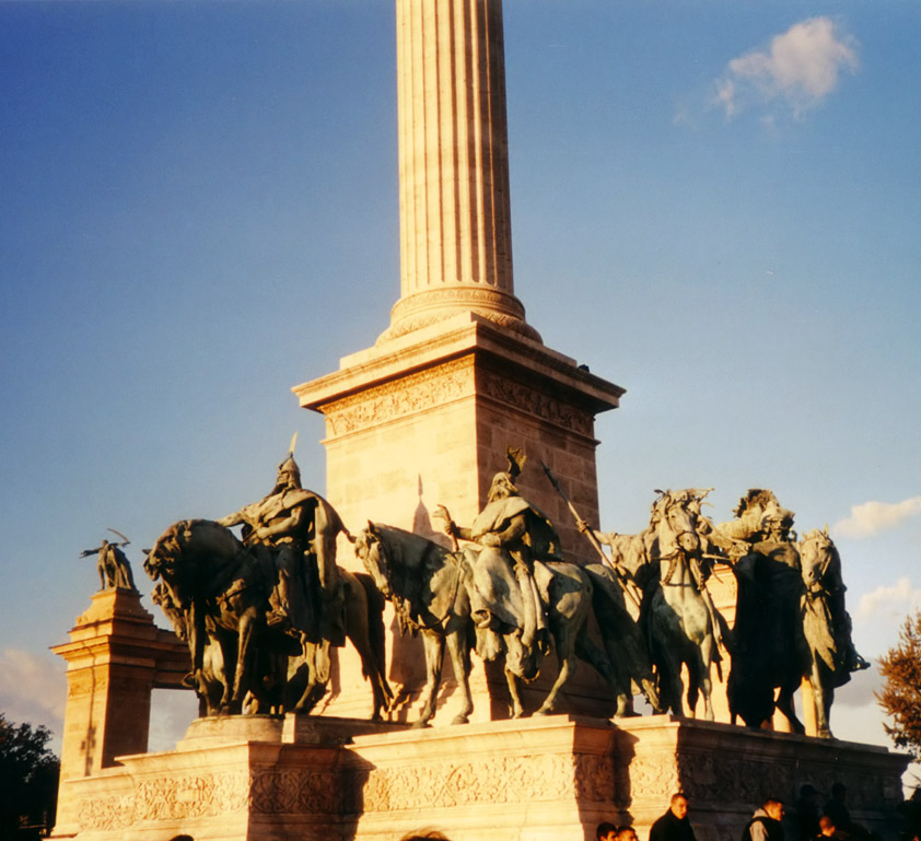 Heldenplatz in Budapest